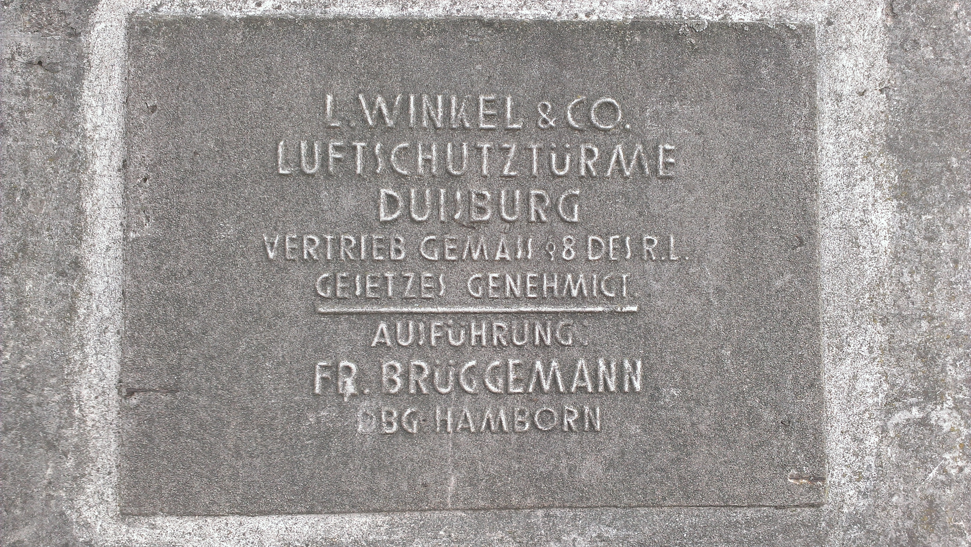 Plakette an dem Winkelturm-Bunker auf dem ehemaligen LMG-Gelände, Lübeck